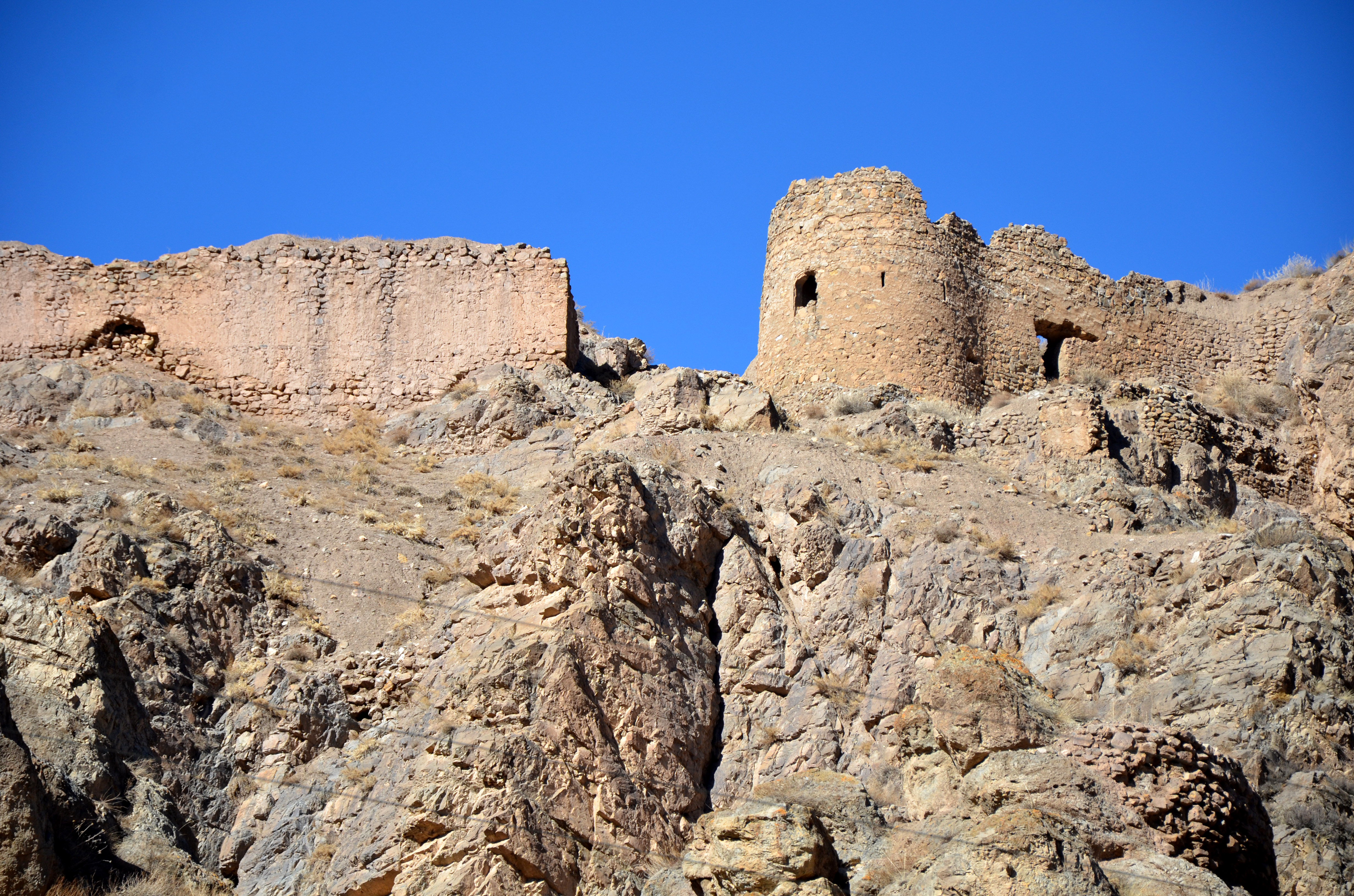 قلعه پولاد